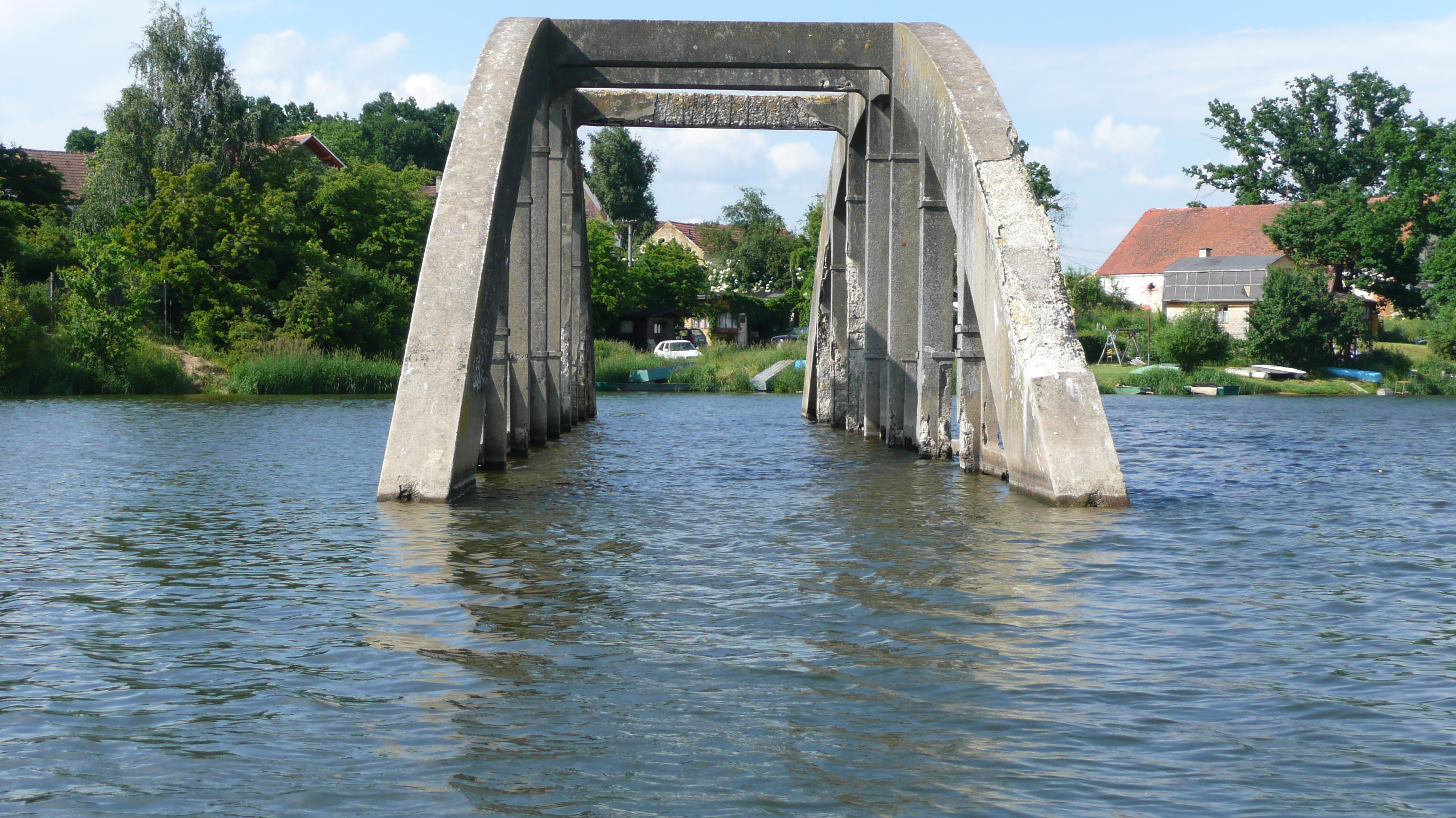 Starý most ve Vodní nádrži Jesenice